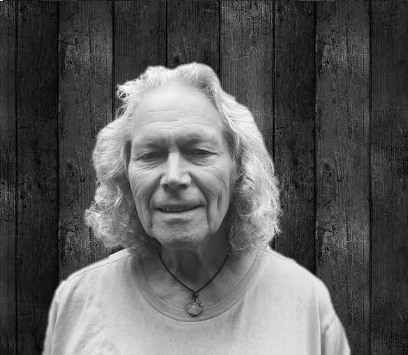 Frits van Swoll